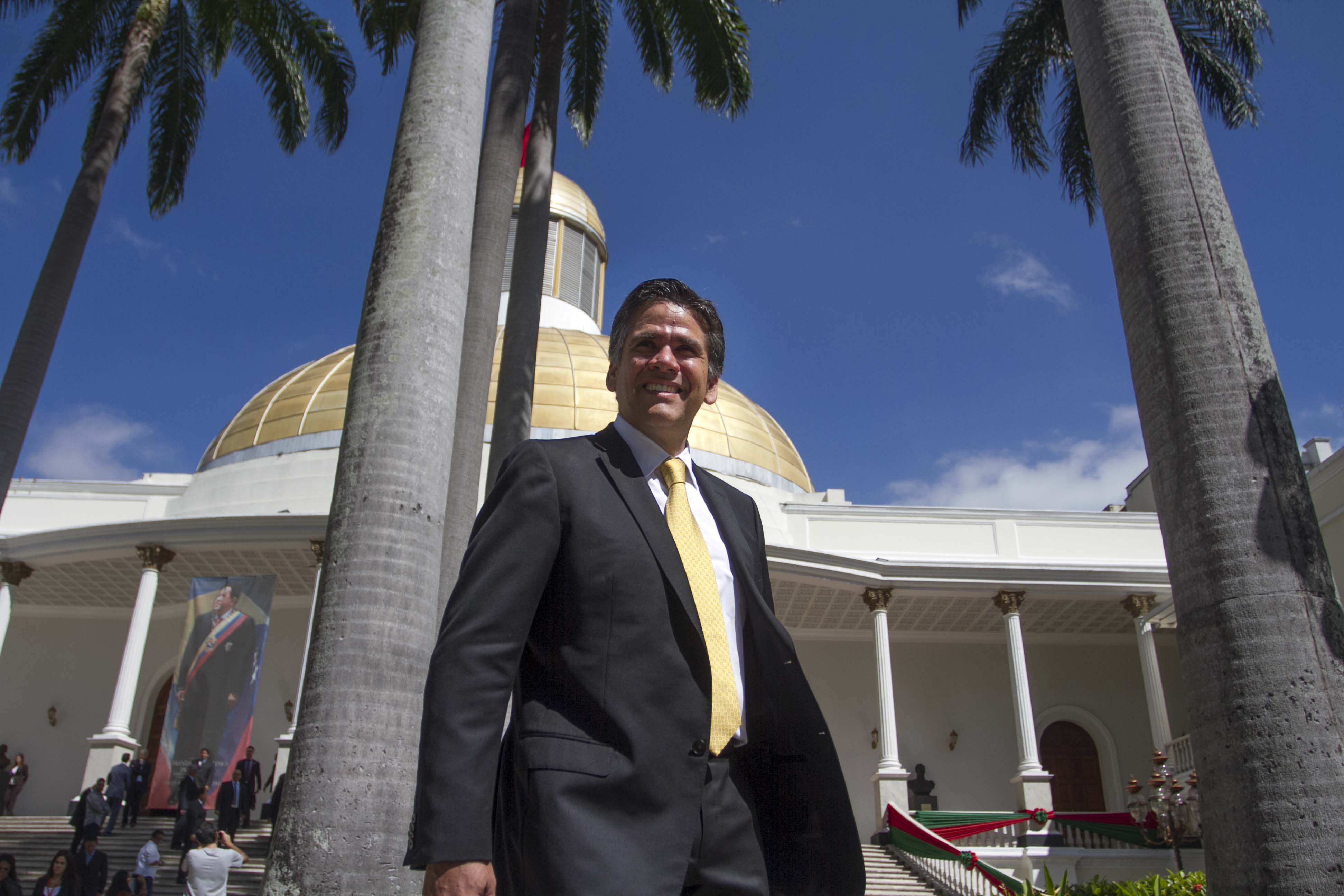 En la instalación de la Asamblea Nacional período 2016-2021